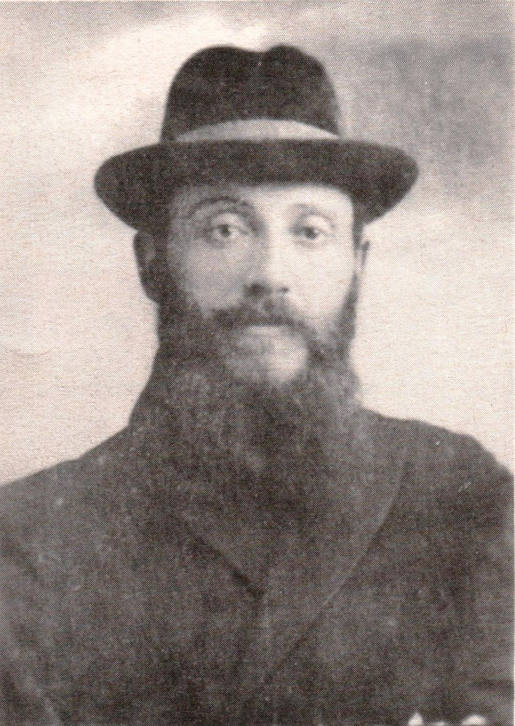 שלום חריטונוב